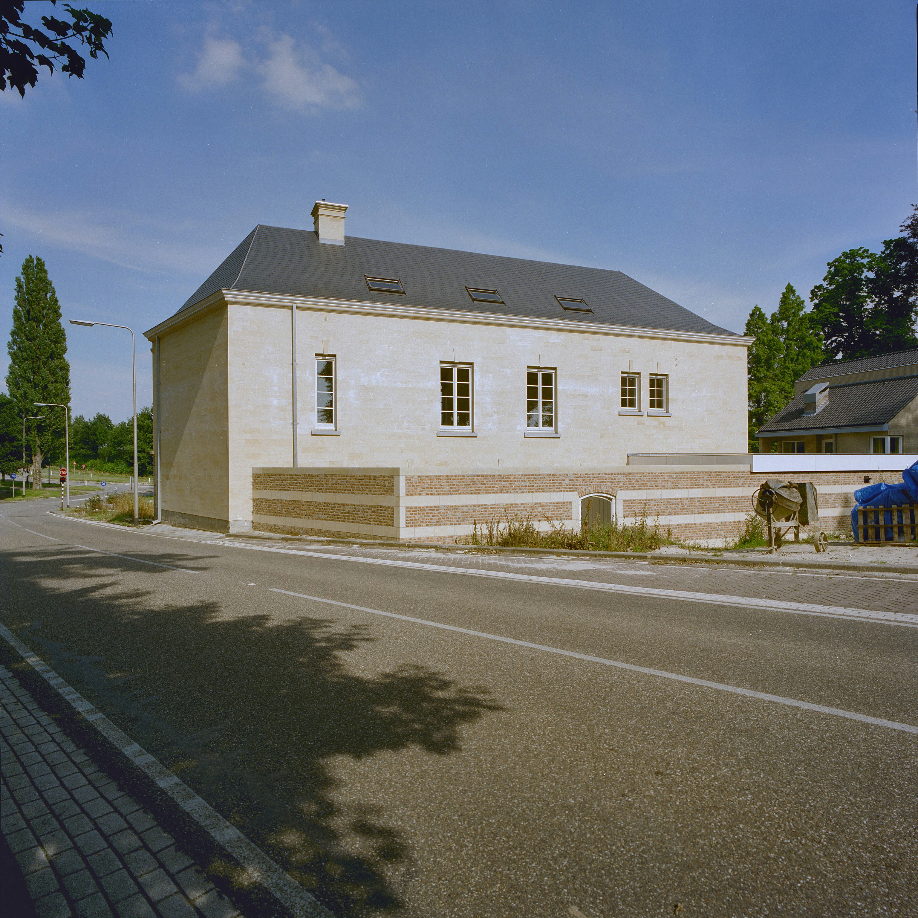 Koetshuis: Exterieur OVERZICHT ACHTERGEVEL, RECHTER ZIJGEVEL